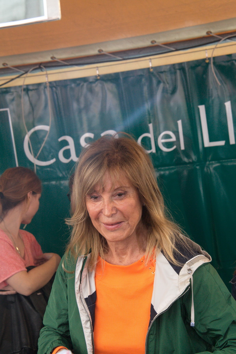 Signatura de llibres en la Diada de Sant Jordi-2015 a Barcelona